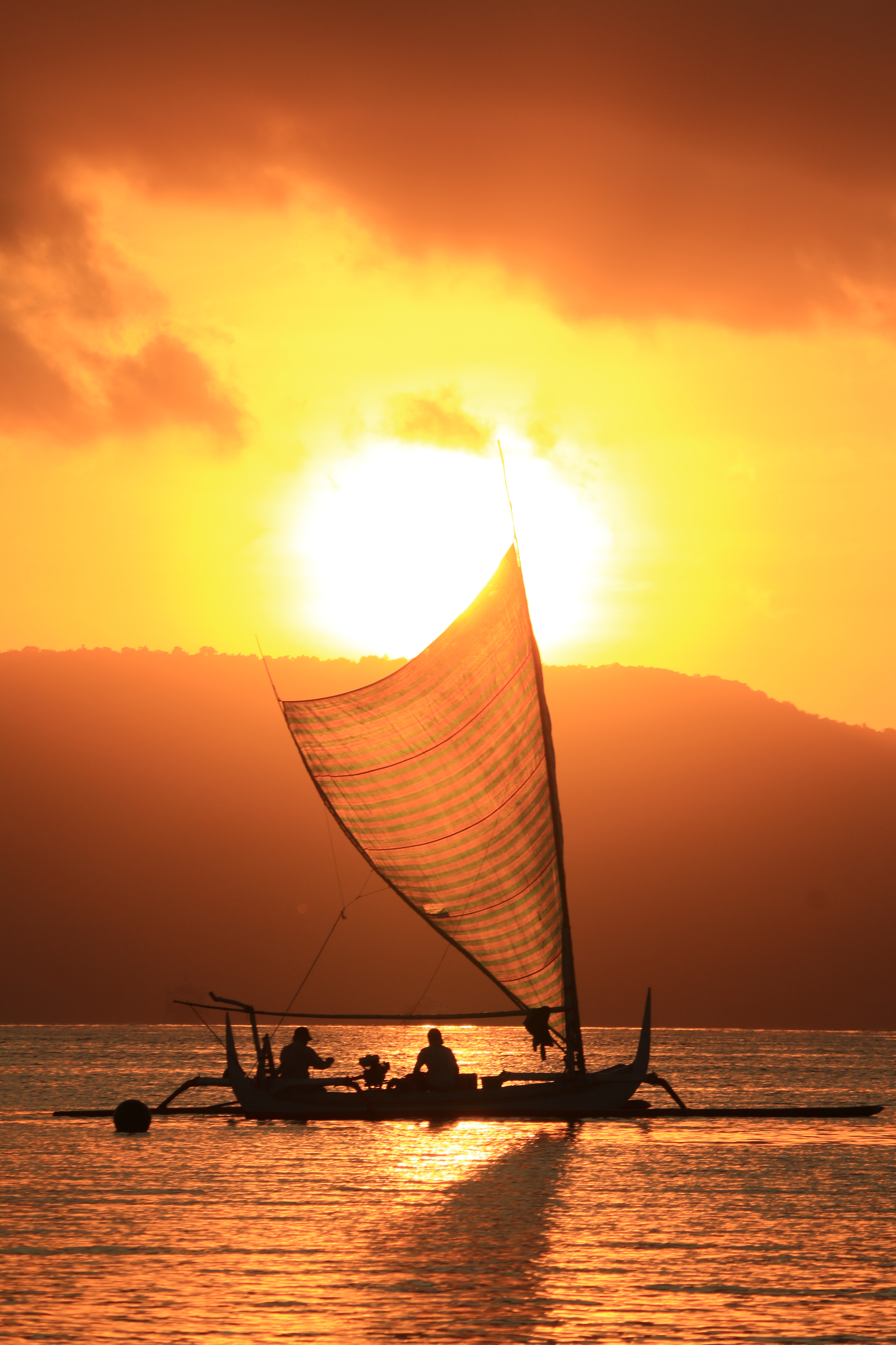 Nelayan yang akan berngkat mencari ikan. Nelayan di dermaga cinta masih sangat tradisional menggunakan tenaga angin.